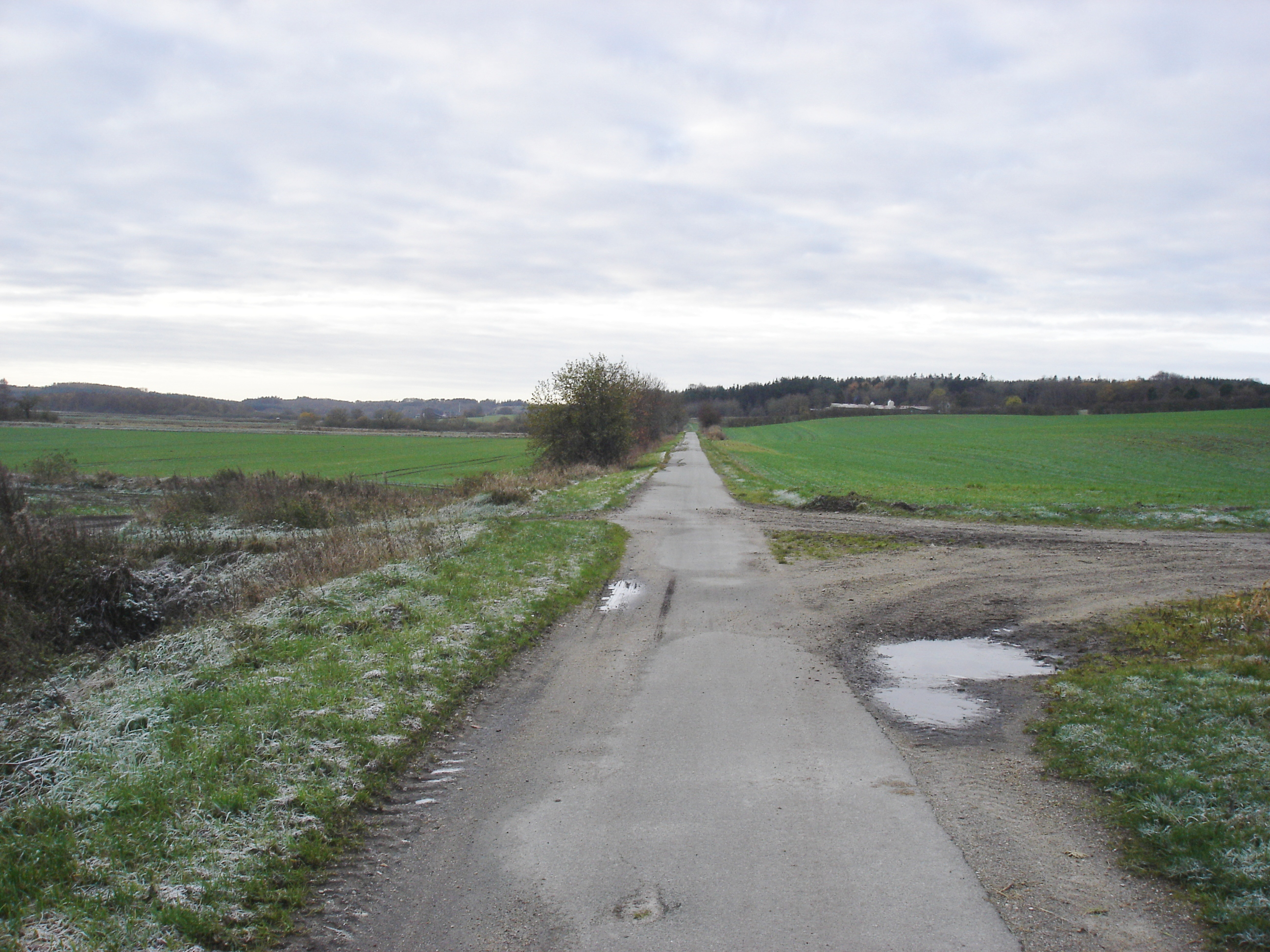 Hadsundruten passerer vejen op til herregården Randrup th. - her lå Randrup trinbræt